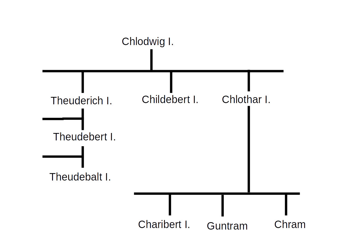 Schematischer Ausschnitt der Stammtafel Chrams. Nur relevante Personen wurden der Übersicht halber aufgenommen, weitere Verwandte mit verlängerten waagrechten Strichen angedeutet. Nach Ian N. Wood: The Merovingian Kingdoms, 450–751. Longman, London 1994, ISBN 0582218780. S. 344f.